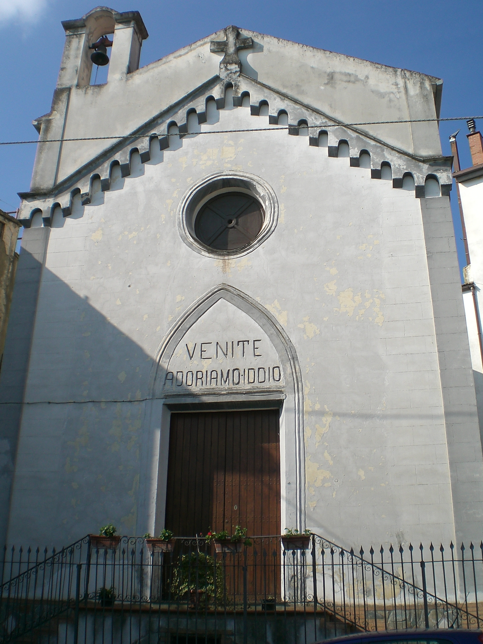 Chiesa Evangelica Metodista di Albanella